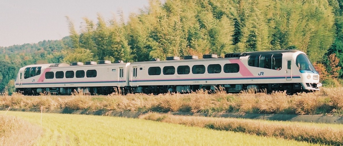 西日本旅客鉄道 キハ65 601 キハ65 1601、 エーデル丹後、 北近畿タンゴ鉄道宮福線 宮村‐喜多